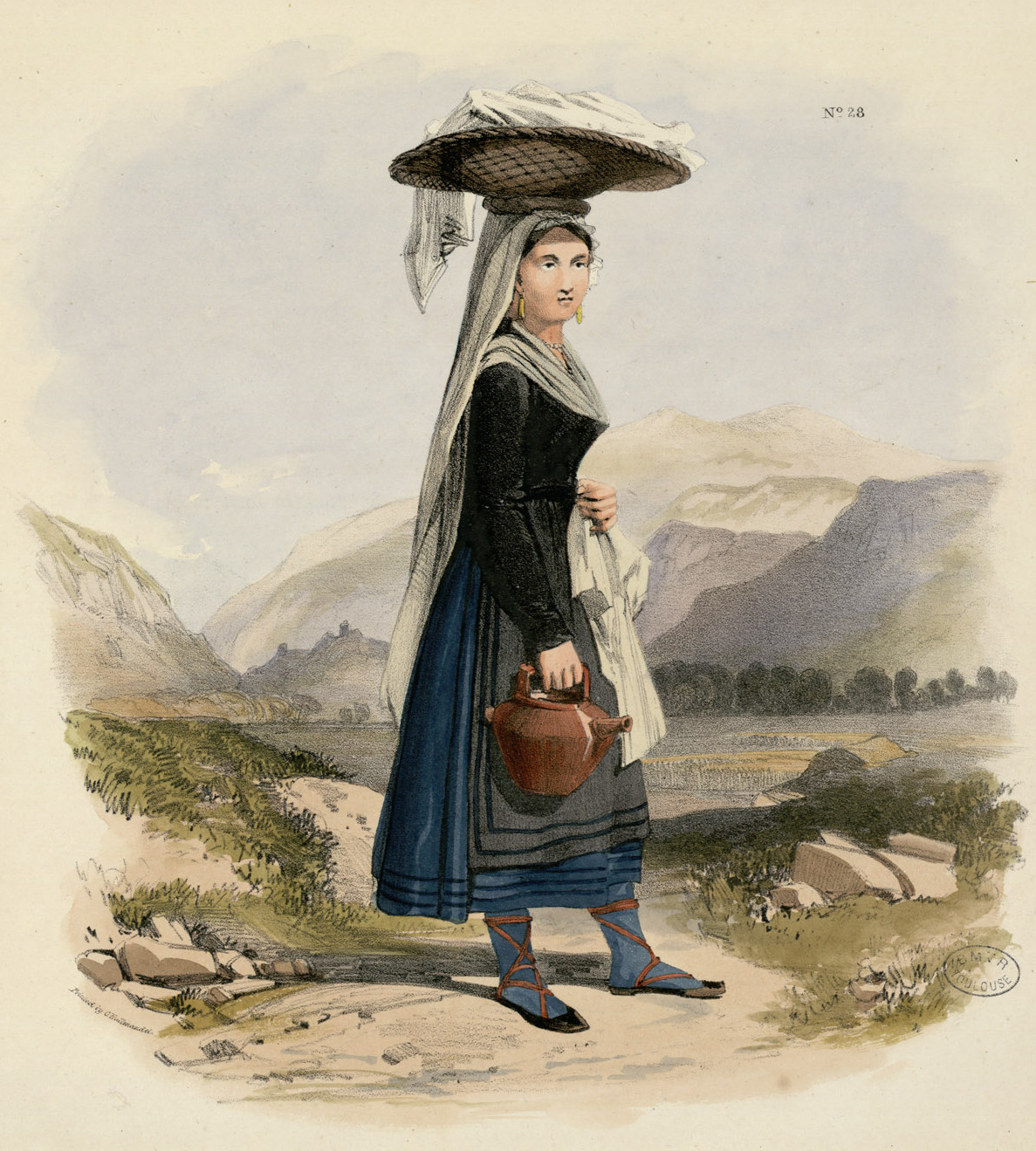 Notice jointe : "To be published by subscription, in royal quarto, the Costumes of the French Pyrenees : consisting of Thirty Drawings of the Male and Female Peasantry of the Pyrenean Valleys, with a characteristic Background. Copied from the Sketches of J. Johnson, Esq.r; drawn on Stone by J. D. Harding; coloured, and accompanied by a Letter-press Description. The work will be published in six parts, each containing five plates. Price of each part : twelve shillings." Ancely, René (1876 - 1966). Possesseur